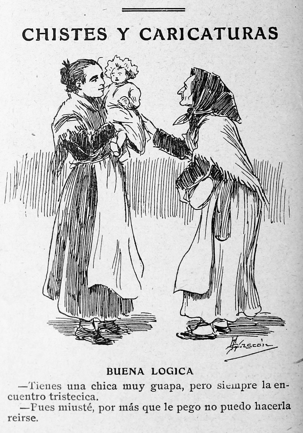 Buena lógica.